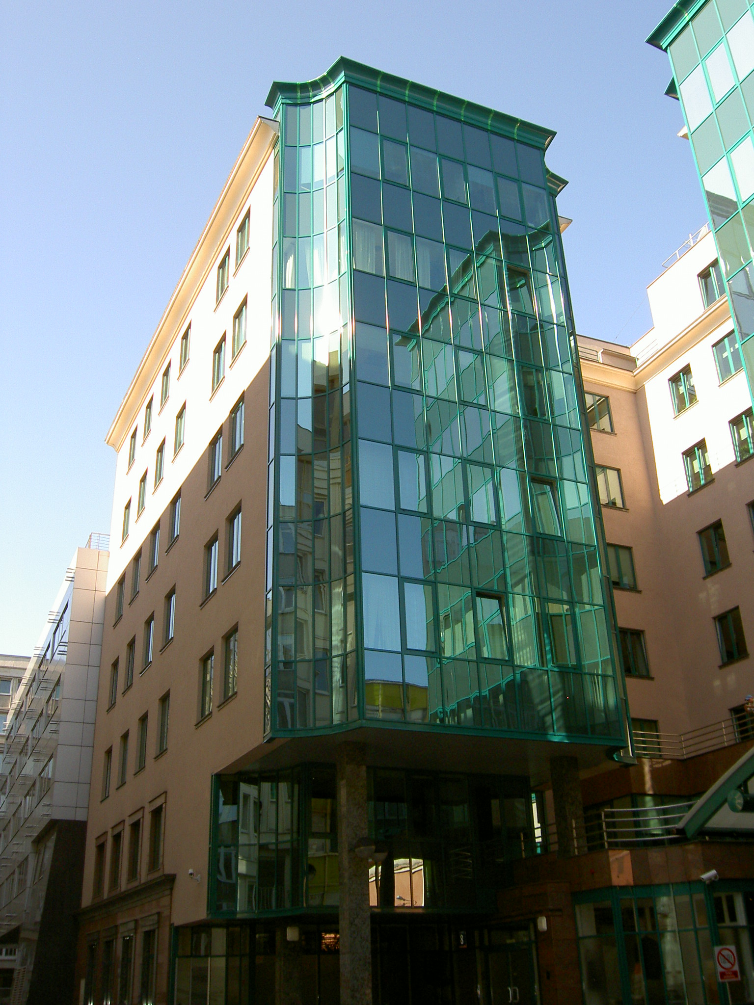 Siedziba Radia ZET w Warszawie autor:Marcin Sikora